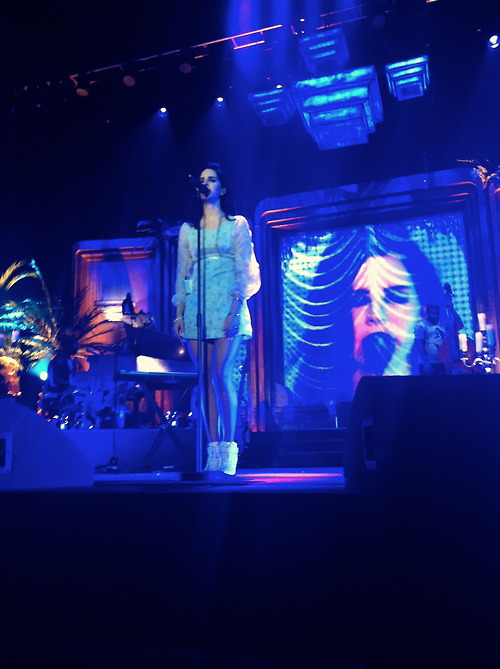 Lana del rey en uno de sus conciertos.